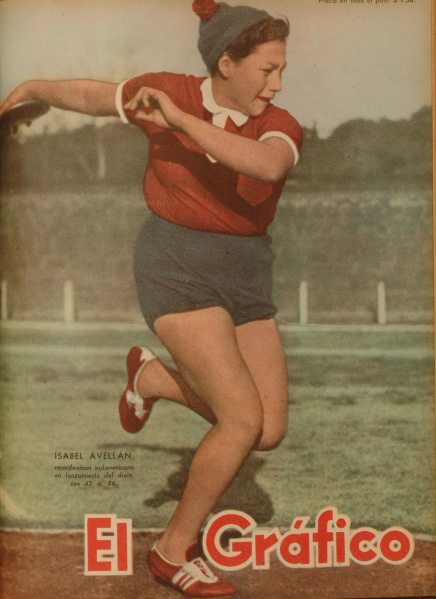 El Grafico del 23 de Octubre de 1953. Edicion 1785